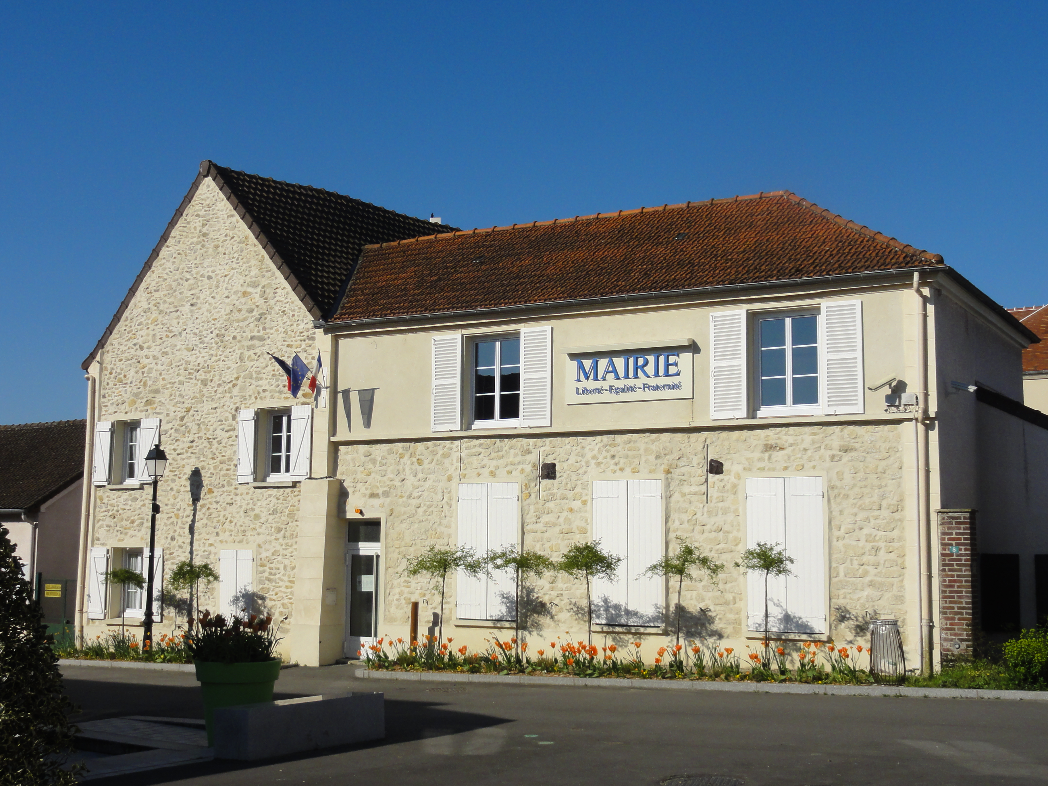 La mairie.